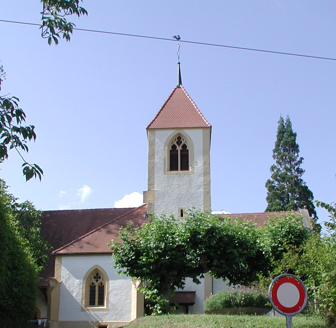 Cudrefin (VD), Suisse; Eglise